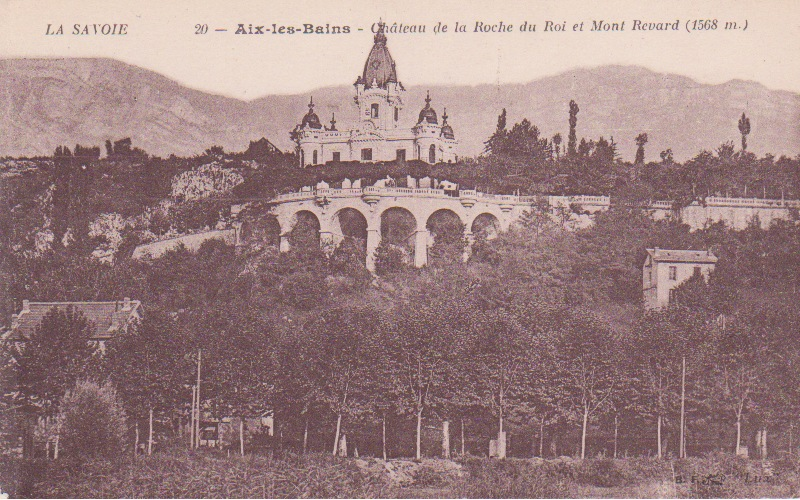 Le chateau de la roche du Roi en Savoie.